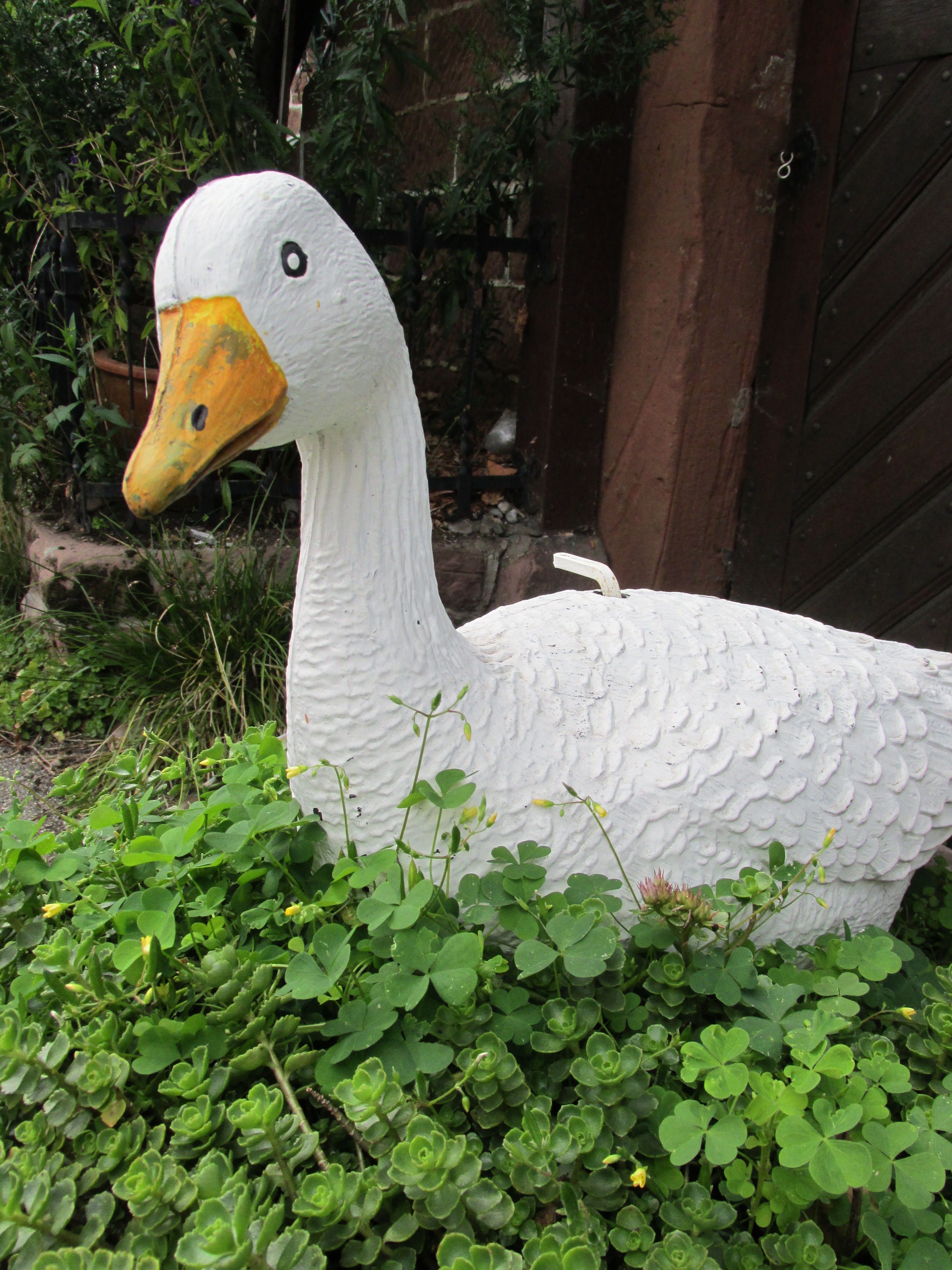 Im Moosalbtal